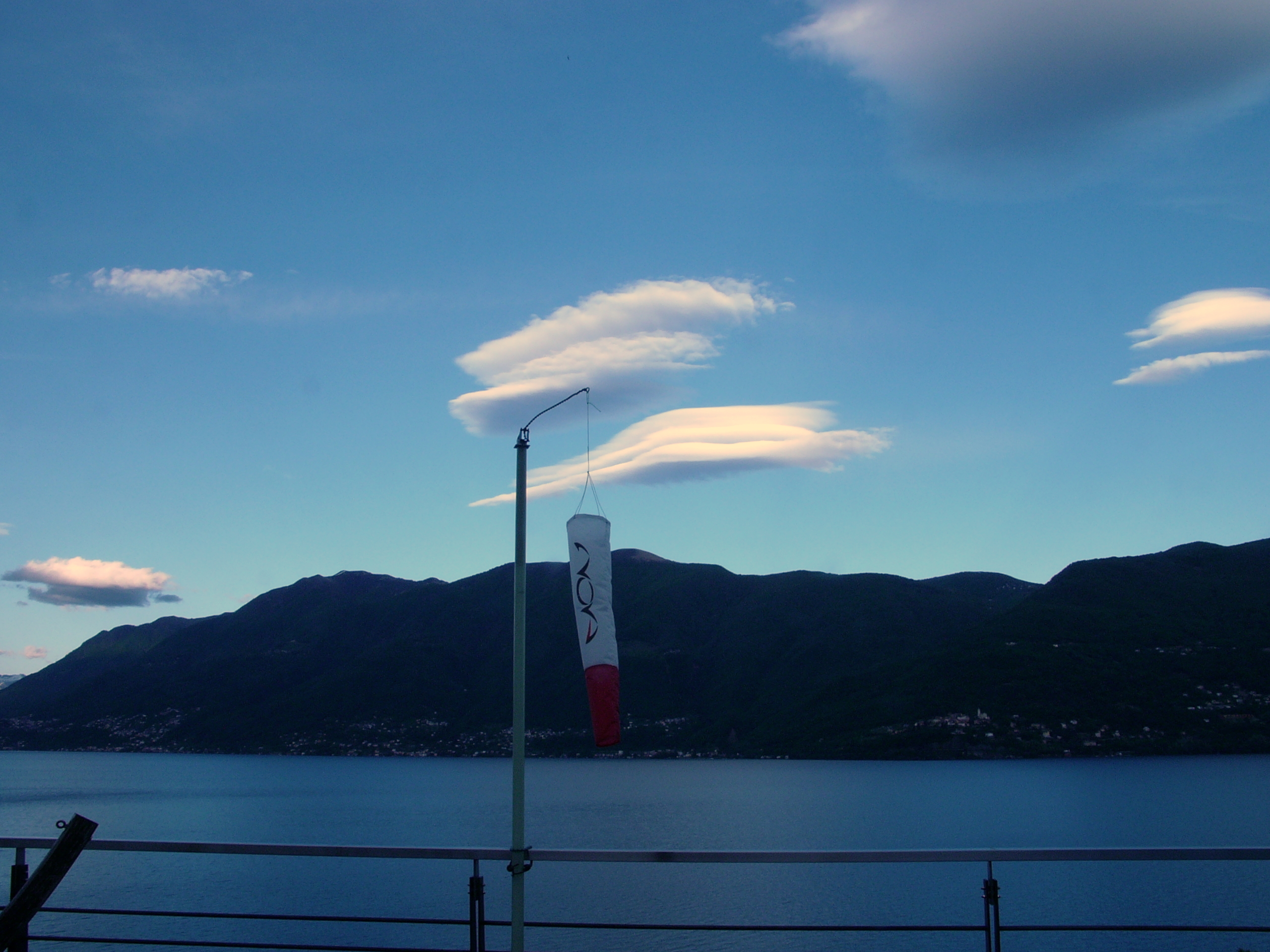 Lenticolari